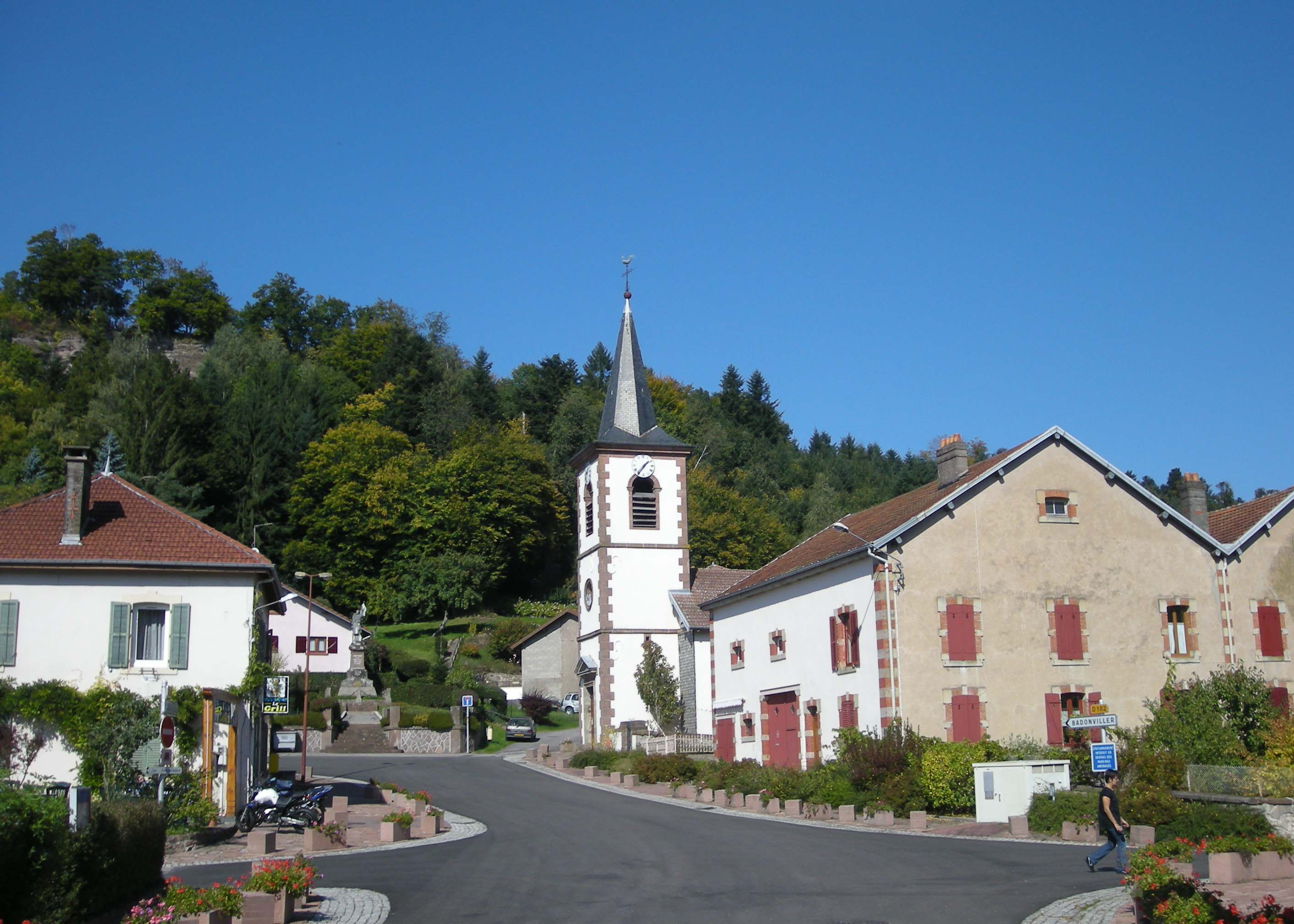 Le monument aux morts et l'église au centre lu village de Pierre-Percée (Meurthe-et-Moselle)